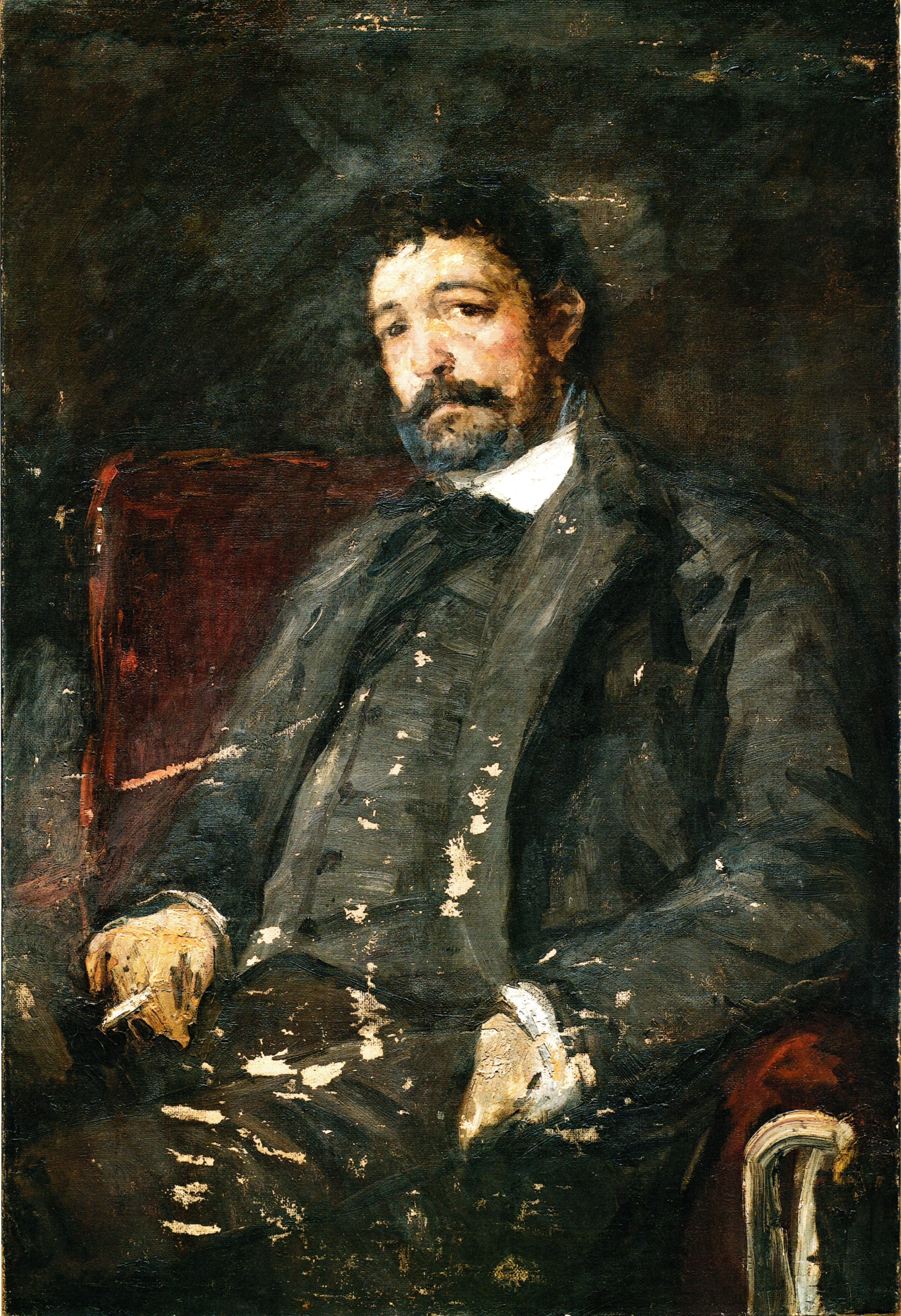 Коровин К.А. Портрет Анджело Мазини.Общий вид лицевой стороны до реставрации.